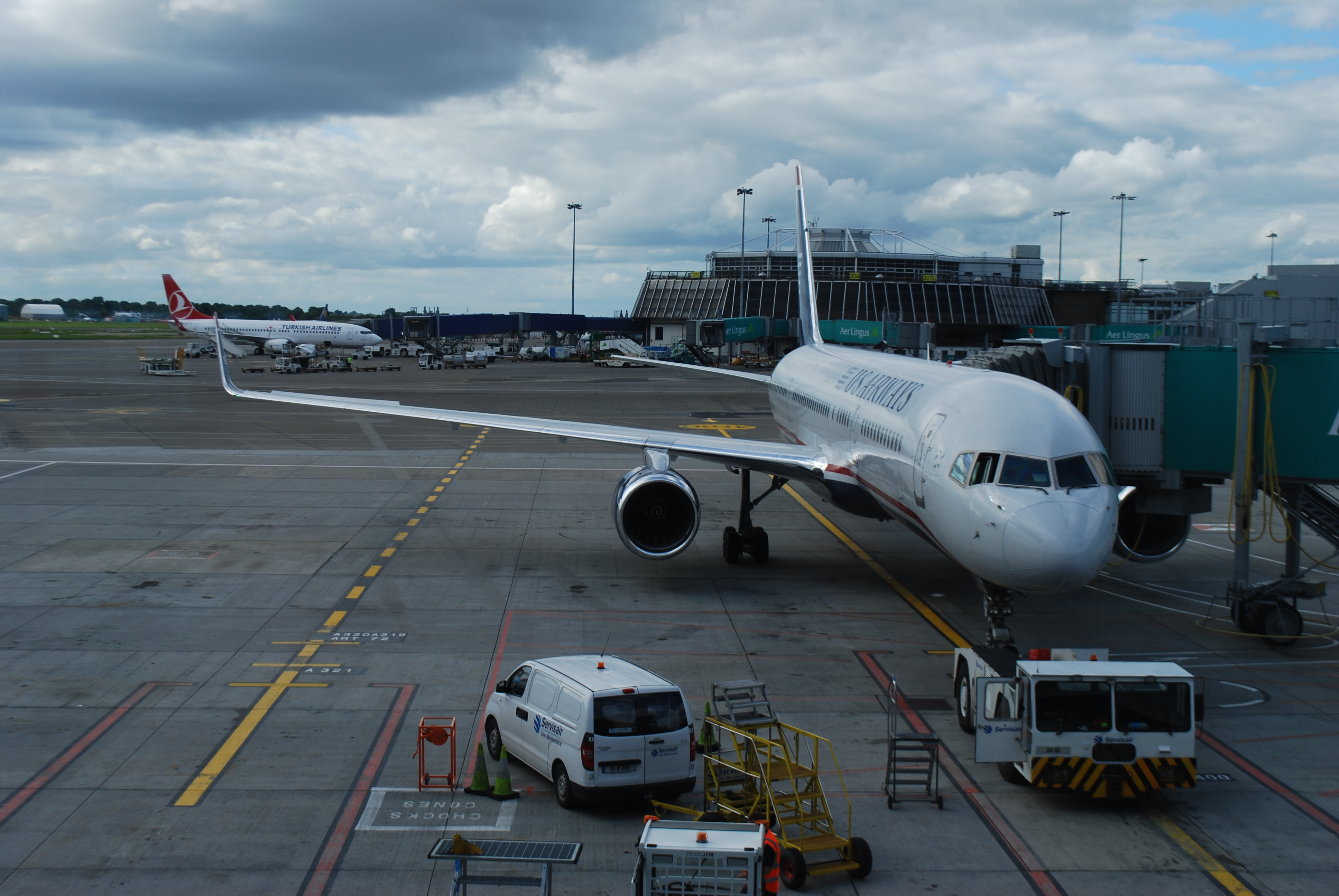 Vue du Terminal 2 de l'aéroport de Dublin.